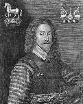 Edward Dering (1598-1644)